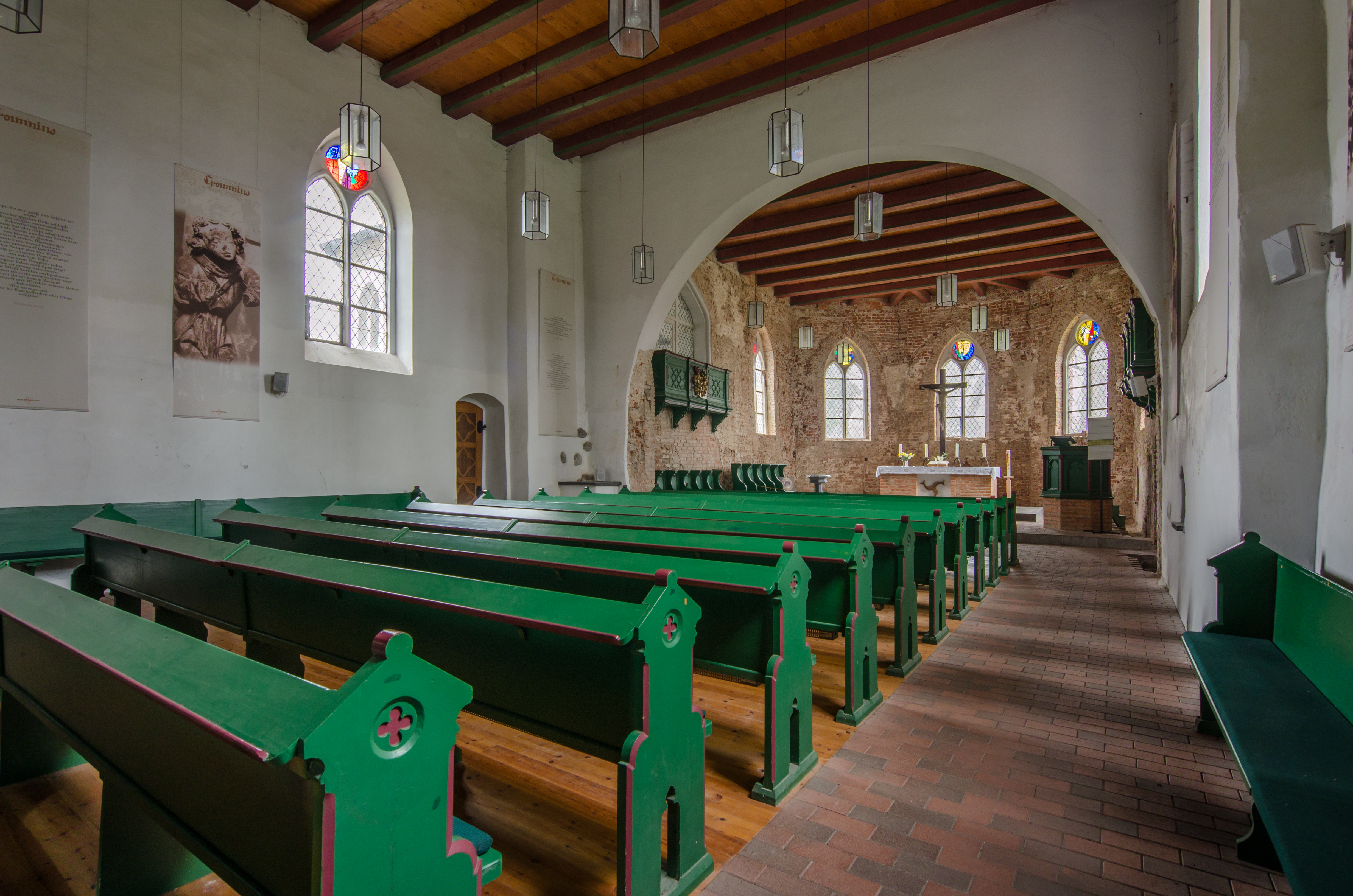 Krummin St, Michael Innenraum